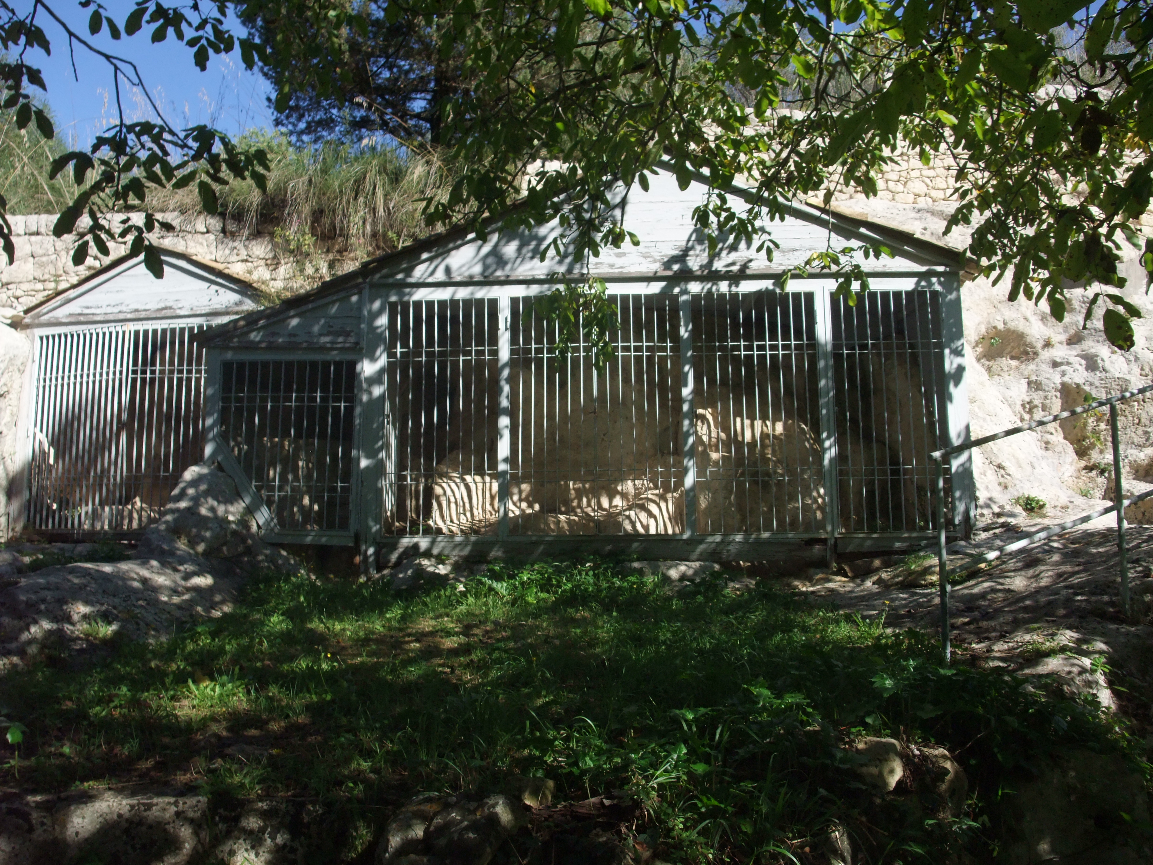 Attuale veduta di insieme del Santuario rupestre di Palazzolo Acreide